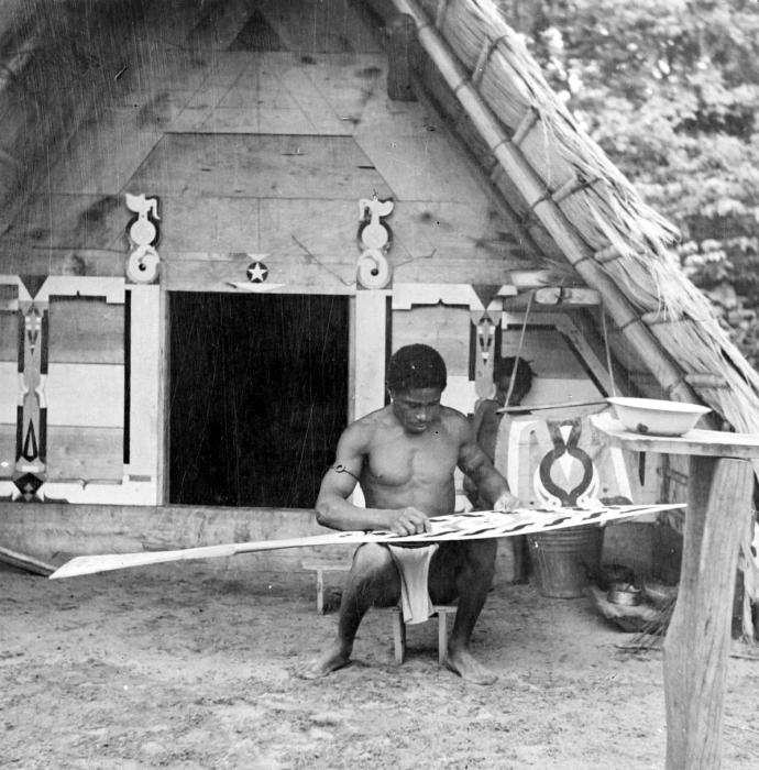 Repronegatief. Het gedeelte van de peddel dat het water ingaat, wordt beschilderd. Het handvat wordt doorgaans versierd met houtsnijwerk. Schilderingen worden vooral gemaakt door de Ndyuka, Paamaka en de Aluku of Boni. De voorgevel van de achterliggende hut is versierd met zowel schilderingen als houtsnijwerk, onder meer in een vogelmorief (toekan snavel).. Een Marron man is bezig een schildering te maken op een peddel